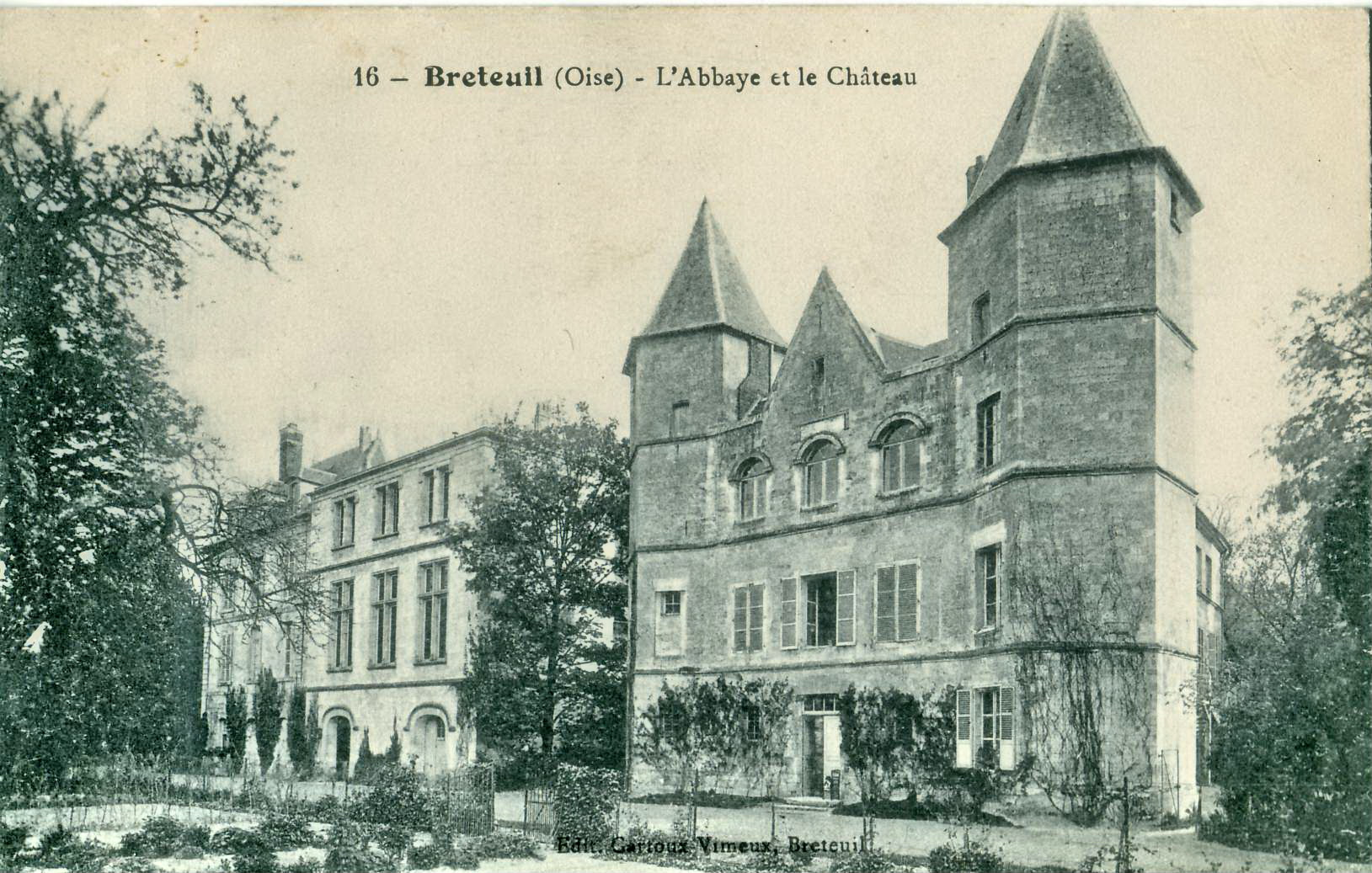 Carte postale ancienne éditée par Cartoux-Vimeu N°16 Breteuil (Oise) : L'Abbaye, comprenant l'ancien logement abbatial à droite et le château dit des moines à gauche